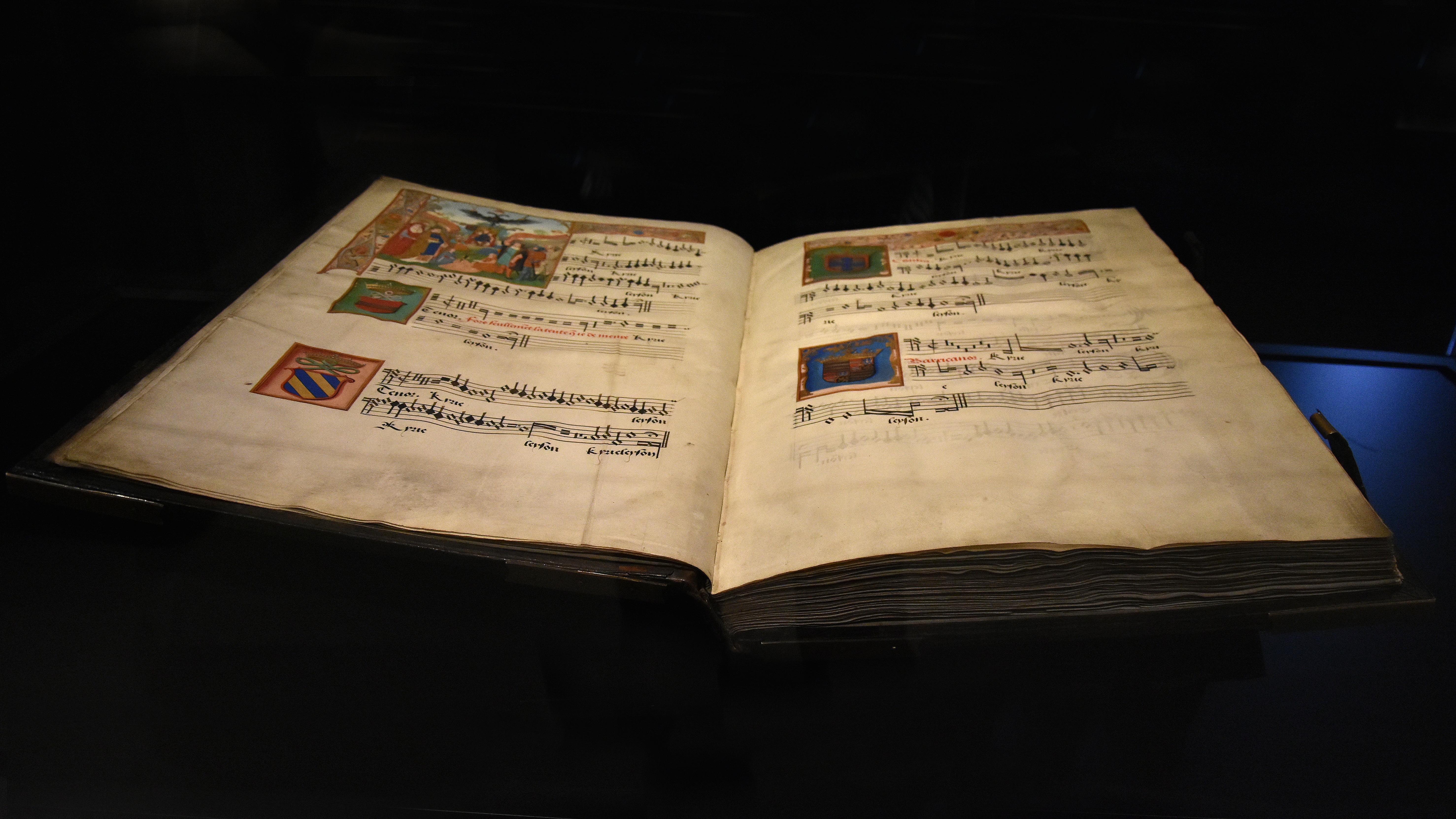 Petrus Alamire (atelier) Koorboek van Margaretha van Oostenrijk (1480-1530) (ca.1515 perkament) Museum Hof van Busleyden Mechelen This photo of movable heritage has been taken in the Flemish Region